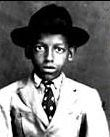 Cartola, compositor brasileiro em 1920, aos 11 anos, na Mangueira